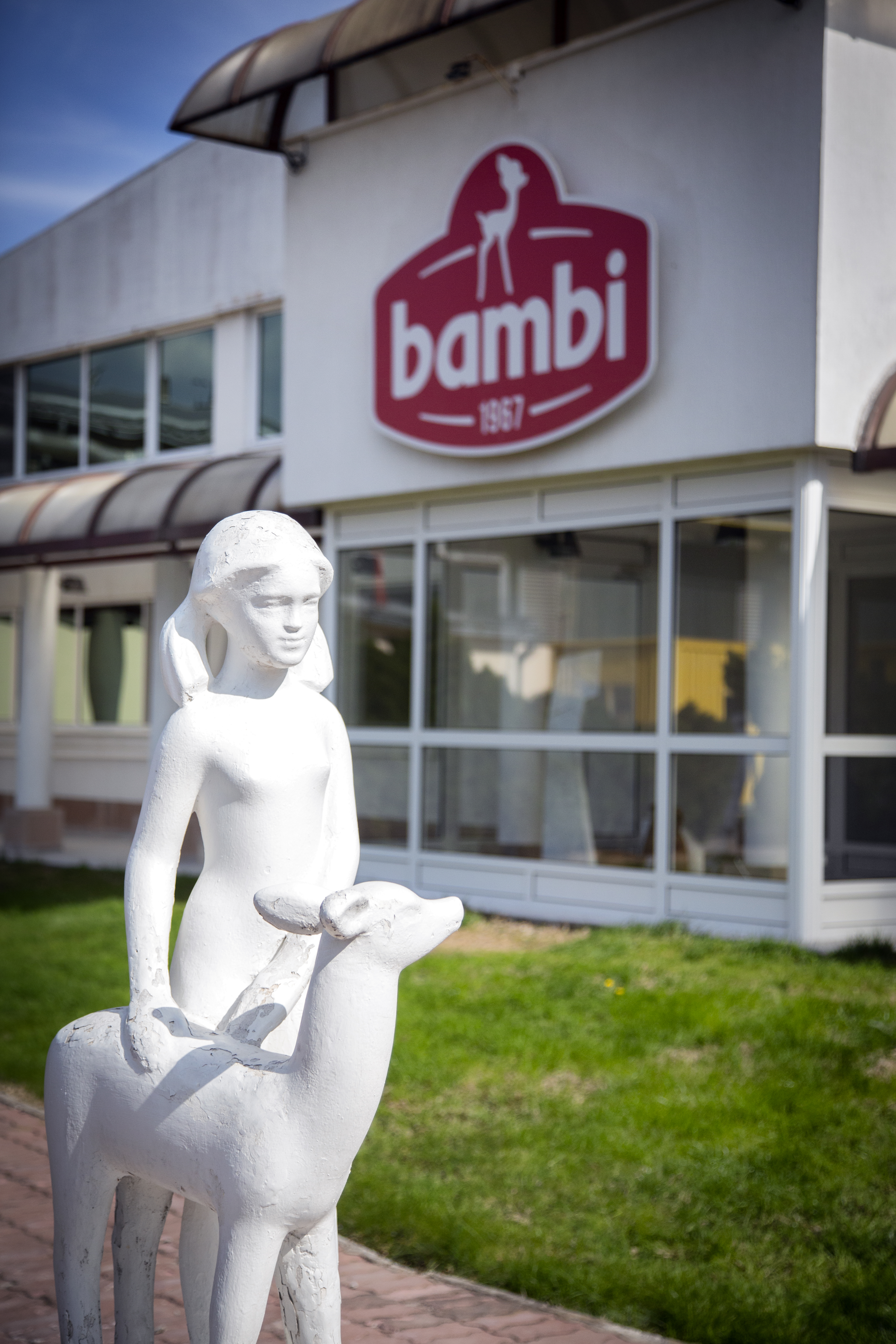 Fabrika kompanije Bambi u Požarevcu, Srbija